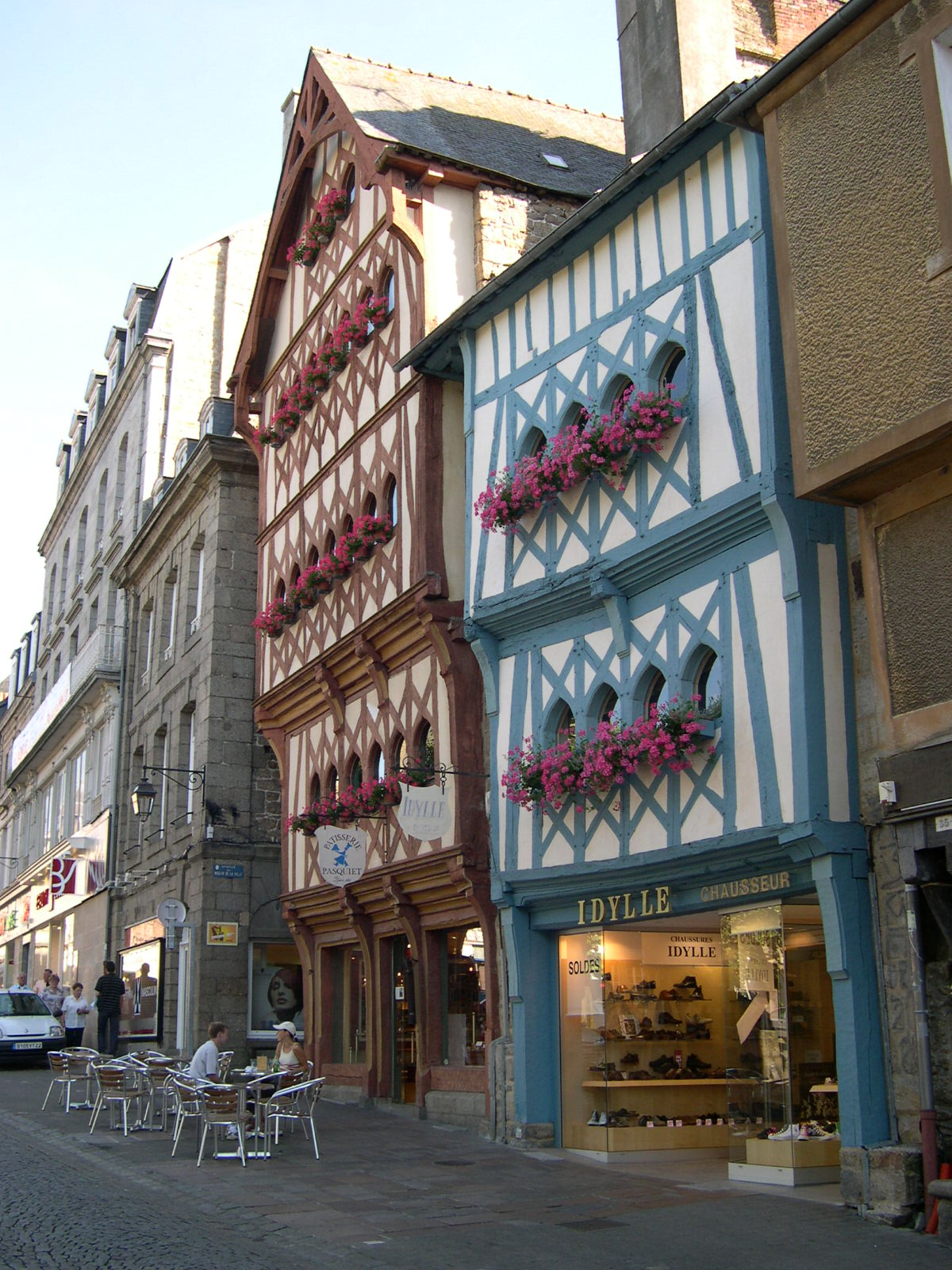 Maison 16eme - 31 place du centre - 31 rue E.Ollivro - Guingamp - Côtes-d'Armor - France .